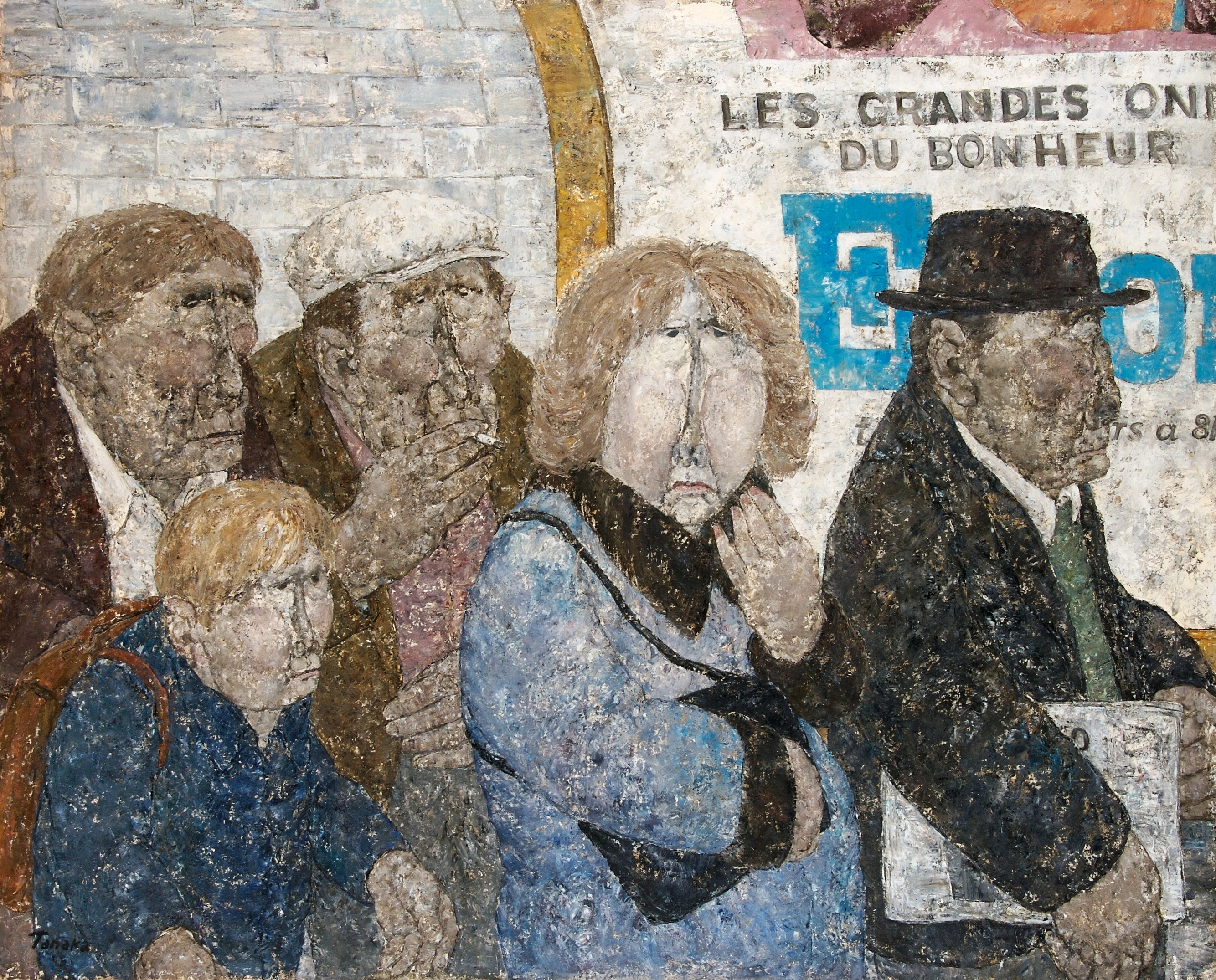 Le quai de métro par le peintre japonais Akira Tanaka, 130x161cm (100F).